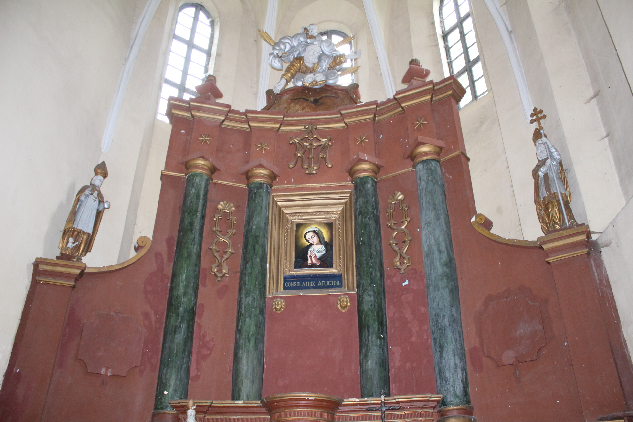 Książ Wielki - kościół rzymskokatolicki pw. św. Ducha, 1372-1381, XVI, XIX (ołtarz)